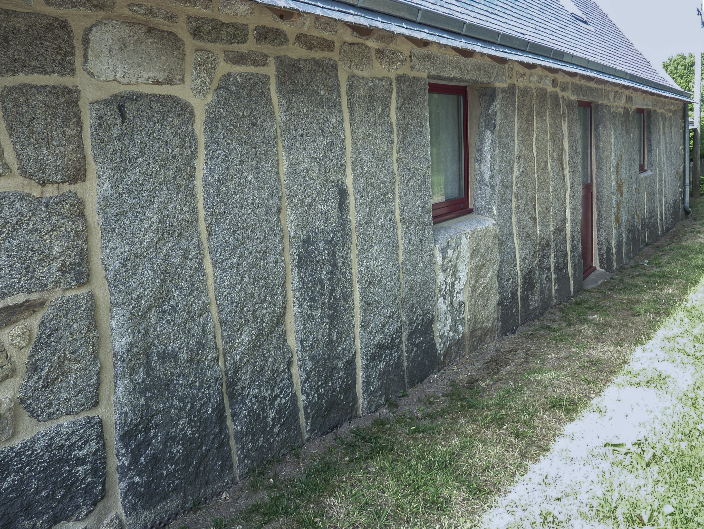 Trégunc : façade d'une maison en "pierres debout" (dans le hameau de Grignallou)